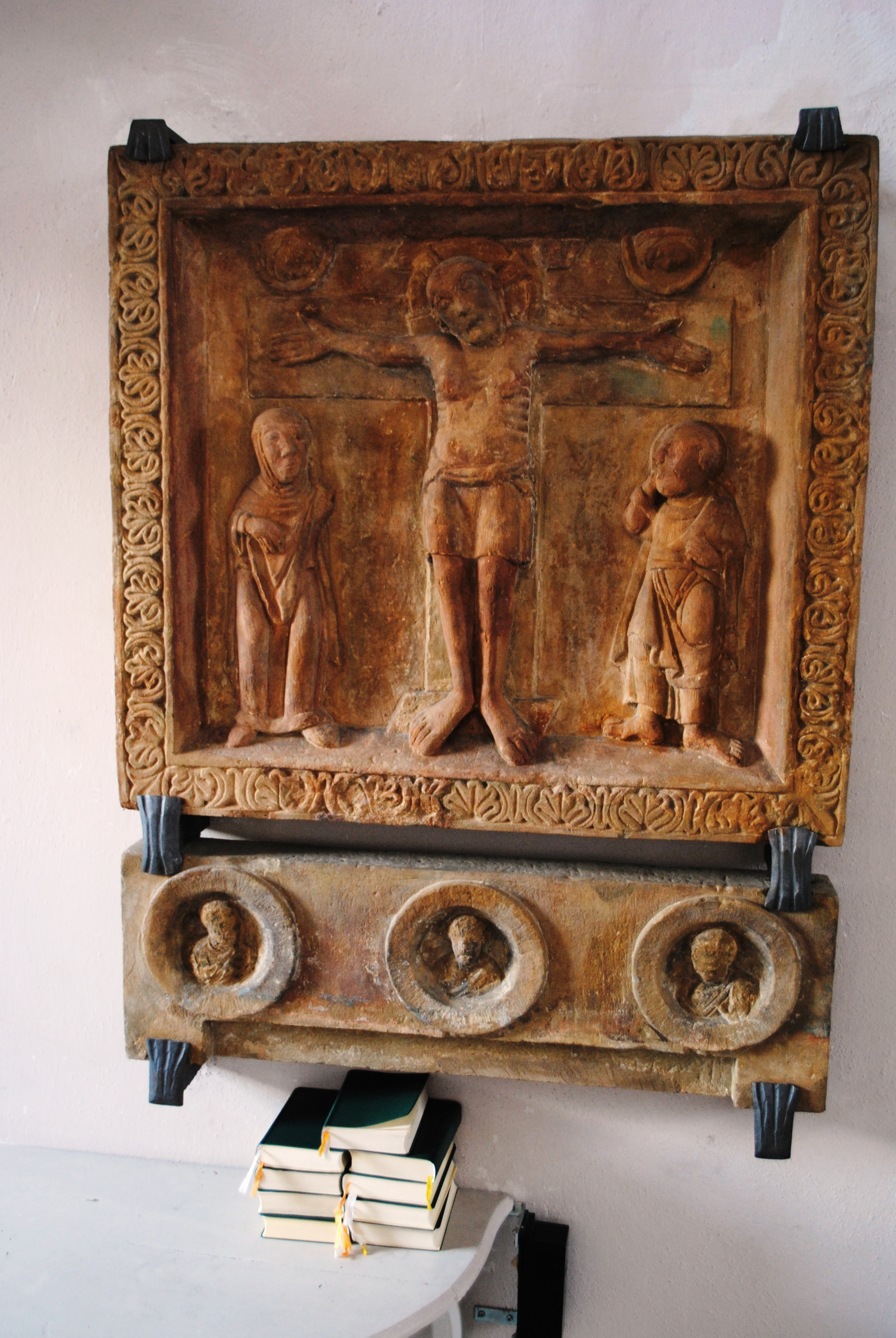 Kirche Dimbach, Volkach, Kreuzigungsrelief